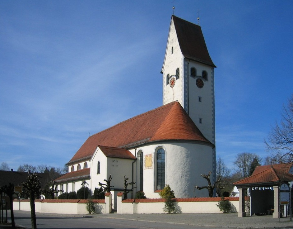 Kirche St. Johannes Evangelist in Amtzell, Landkreis Ravensburg